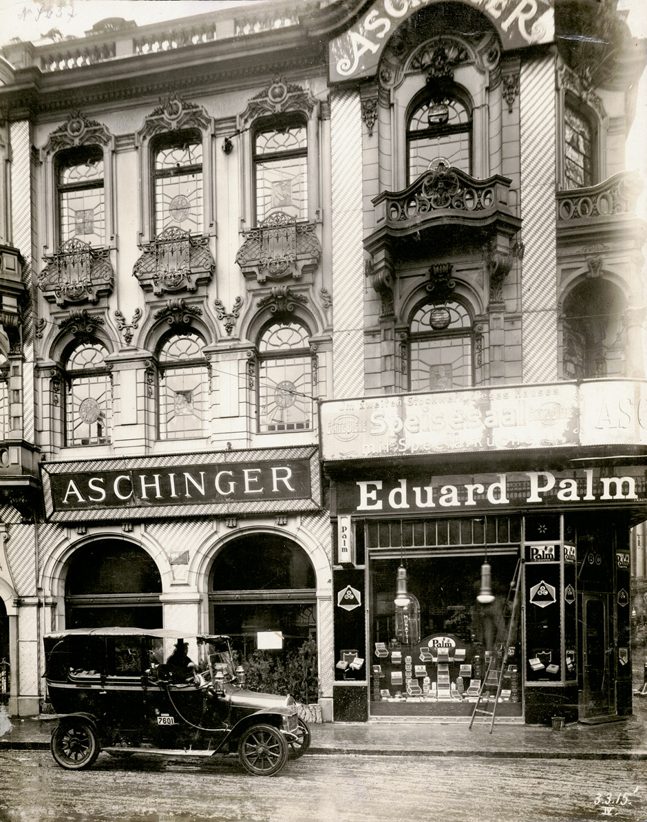 Berlin, Foto aus der Zeit des U-Bahn-Baus 1907–1915; ca. 28 x 23 cm. Mit Datum rechts unten. Filiale des Gastronomiebetriebs Aschinger und Filiale des Tabakhändlers Eduard Palm (beide im ganzen Stadtgebiet vorhanden); Ansicht in der Georgenstr, Ecke Friedrichstraße 97 (beim Bahnhof Friedrichstraße)